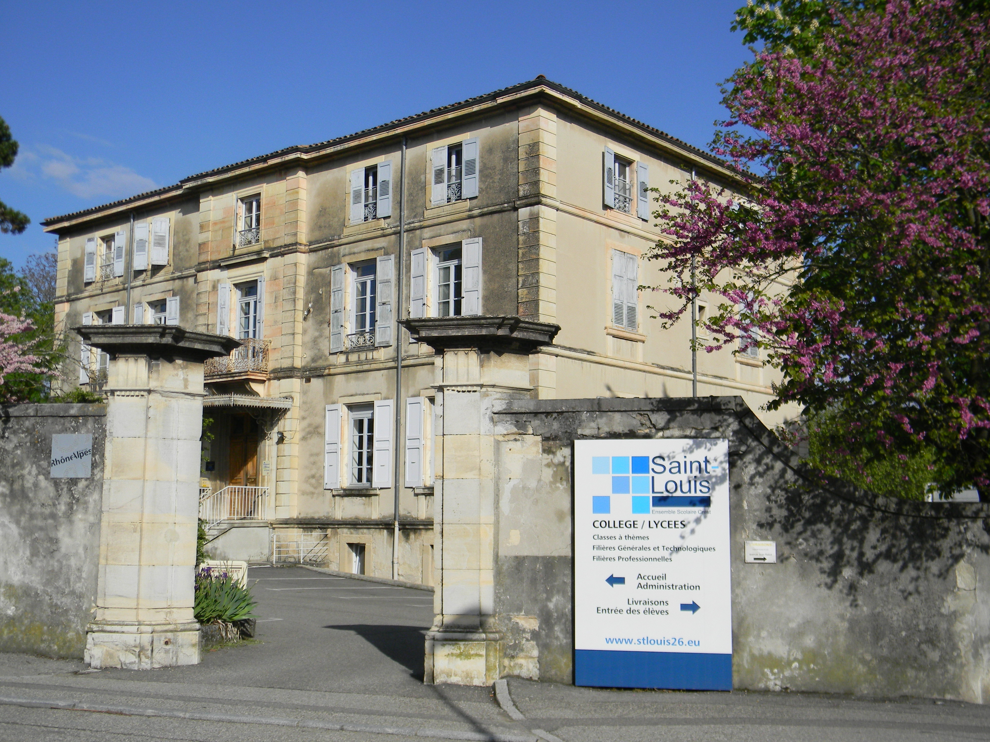 Saint-Louis : collège et lycées à Crest.